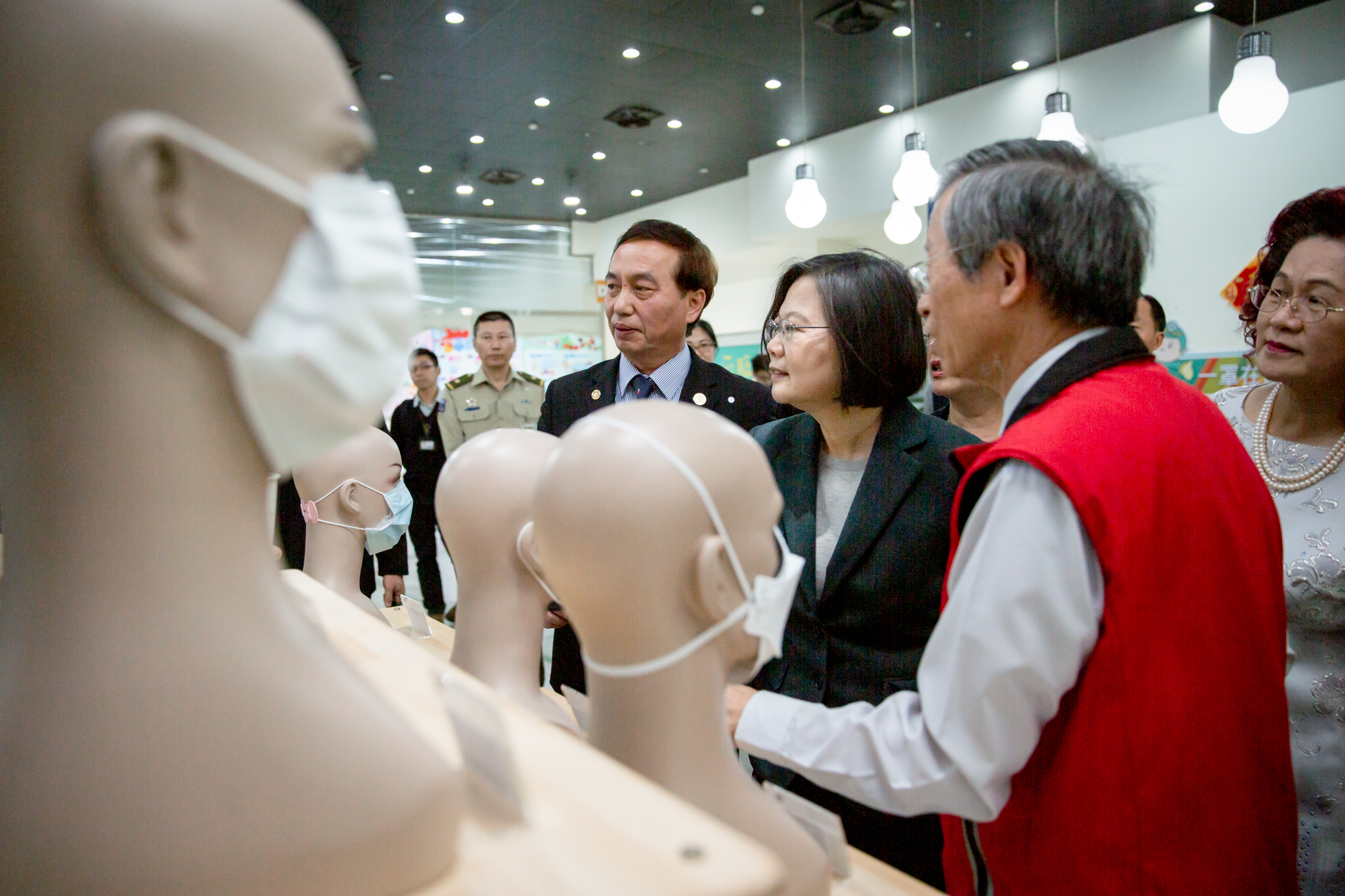 03.13 總統參訪「華新創意生活館口罩觀光工廠」暨訪視受傷員工